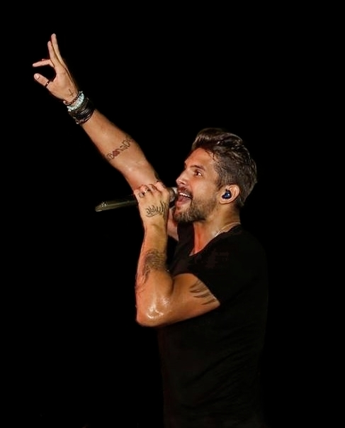 Banda Eva em 2017